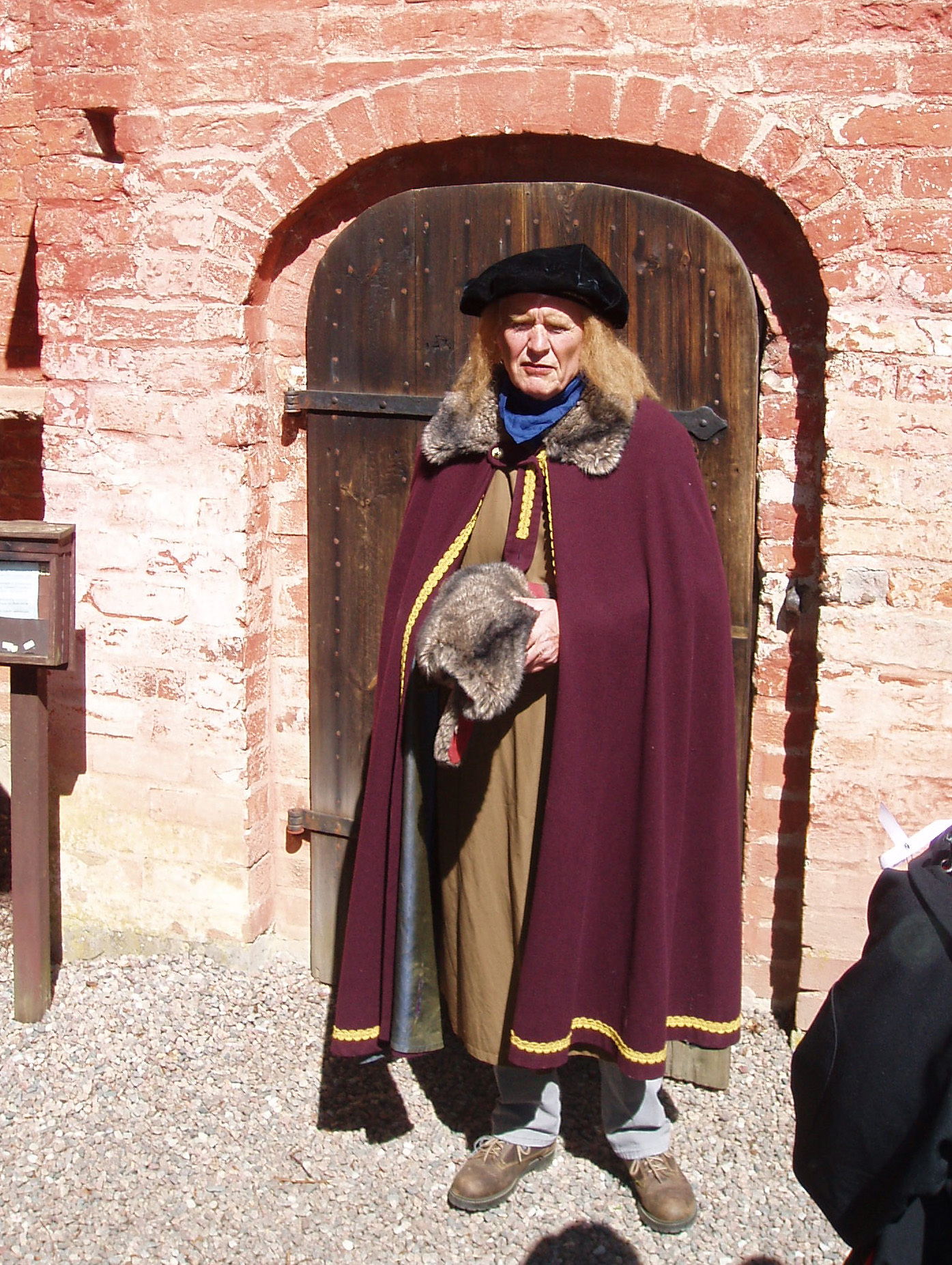 A man playing Marten Skinnare